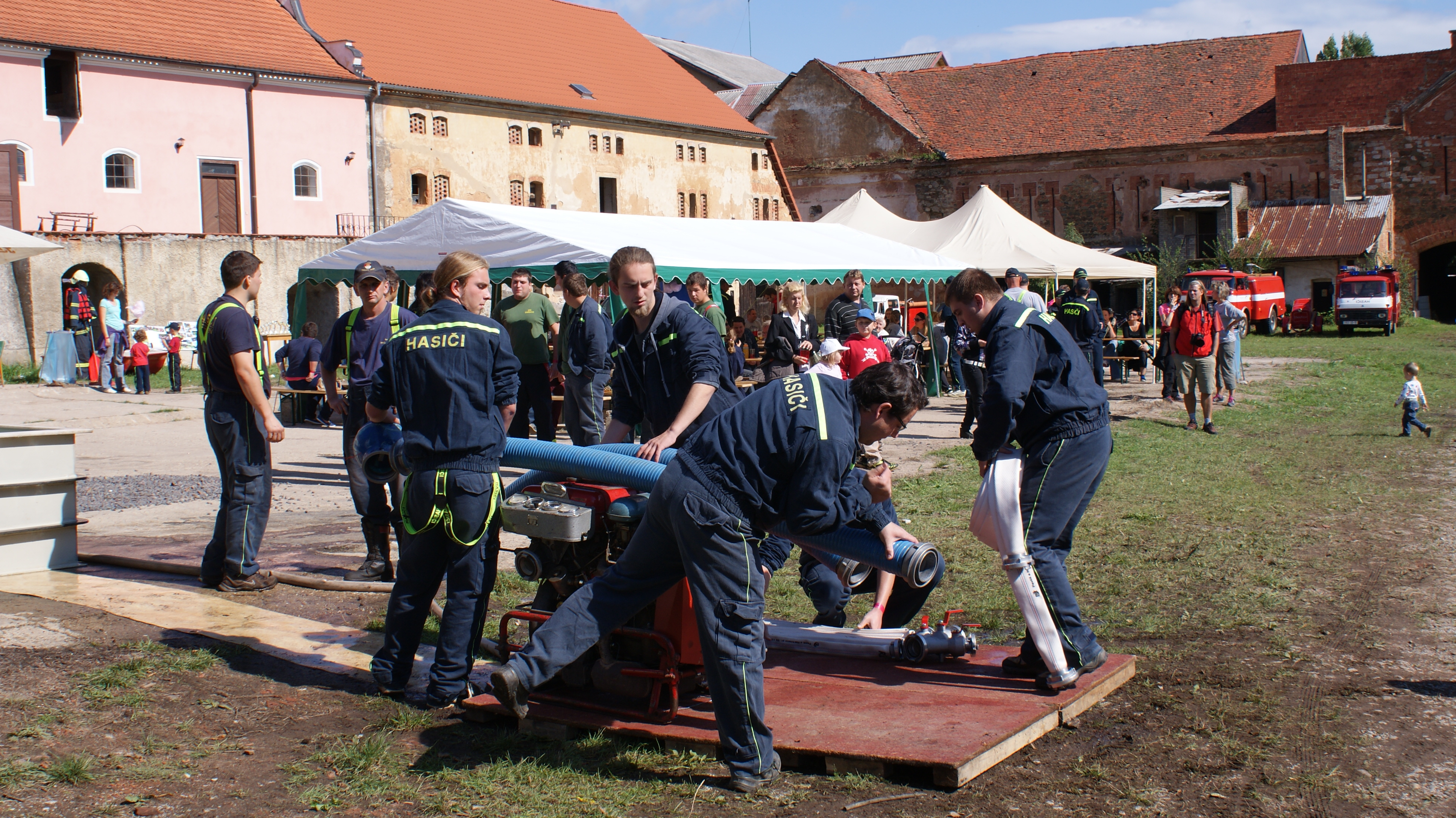 Příprava požárního útoku.Loučení s létem pořádané Liteňskými hasiči